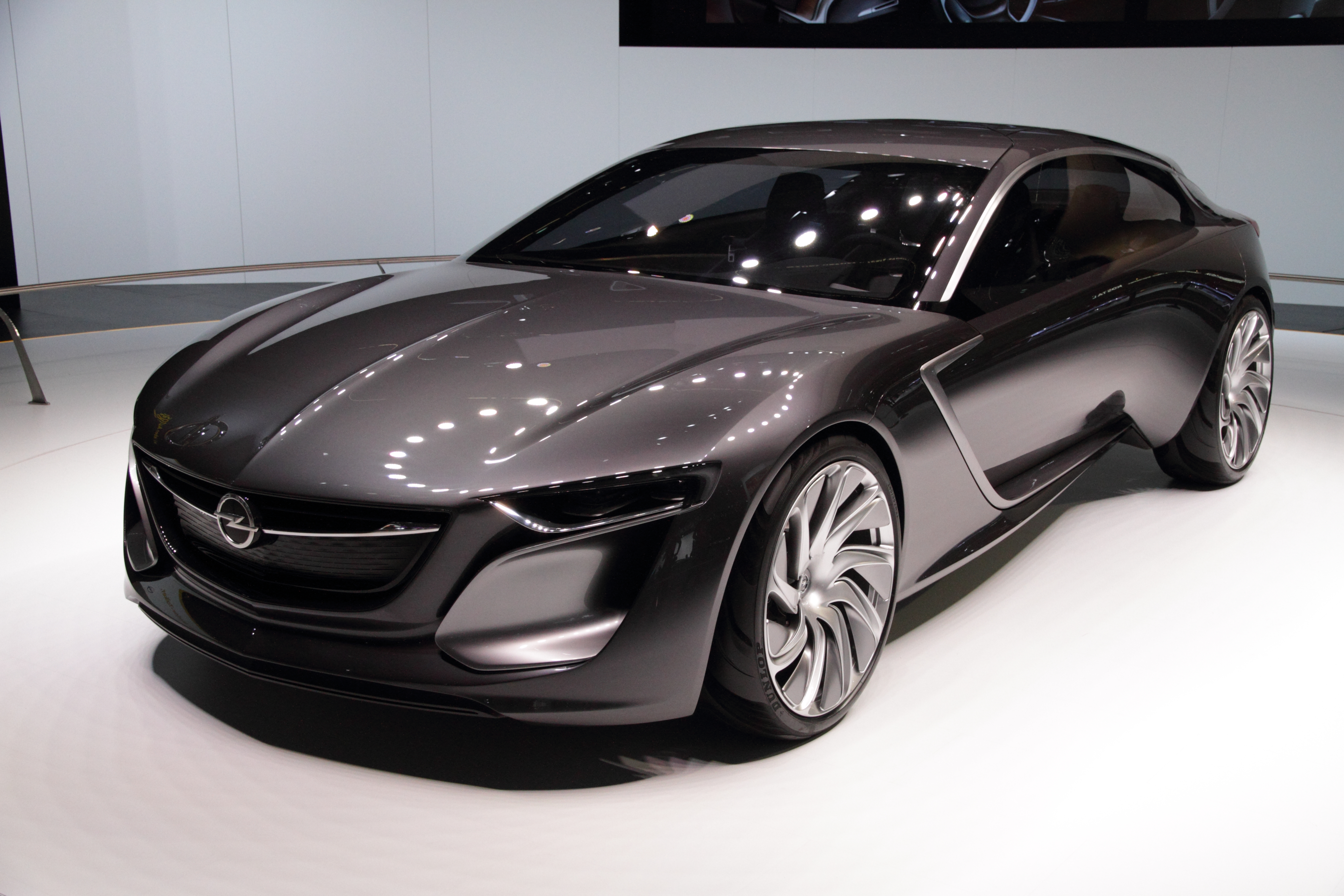 IAA 2013 Frankfurt Germany Opel Monza Concept